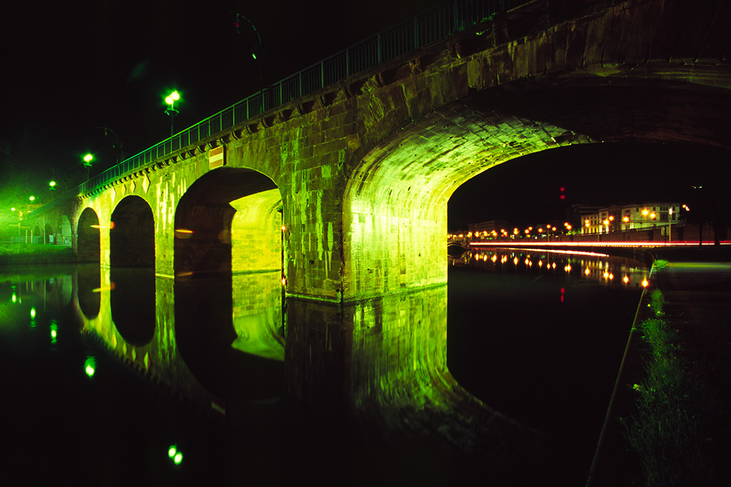 Alte Brücke Saarbrücken Anmerkungen